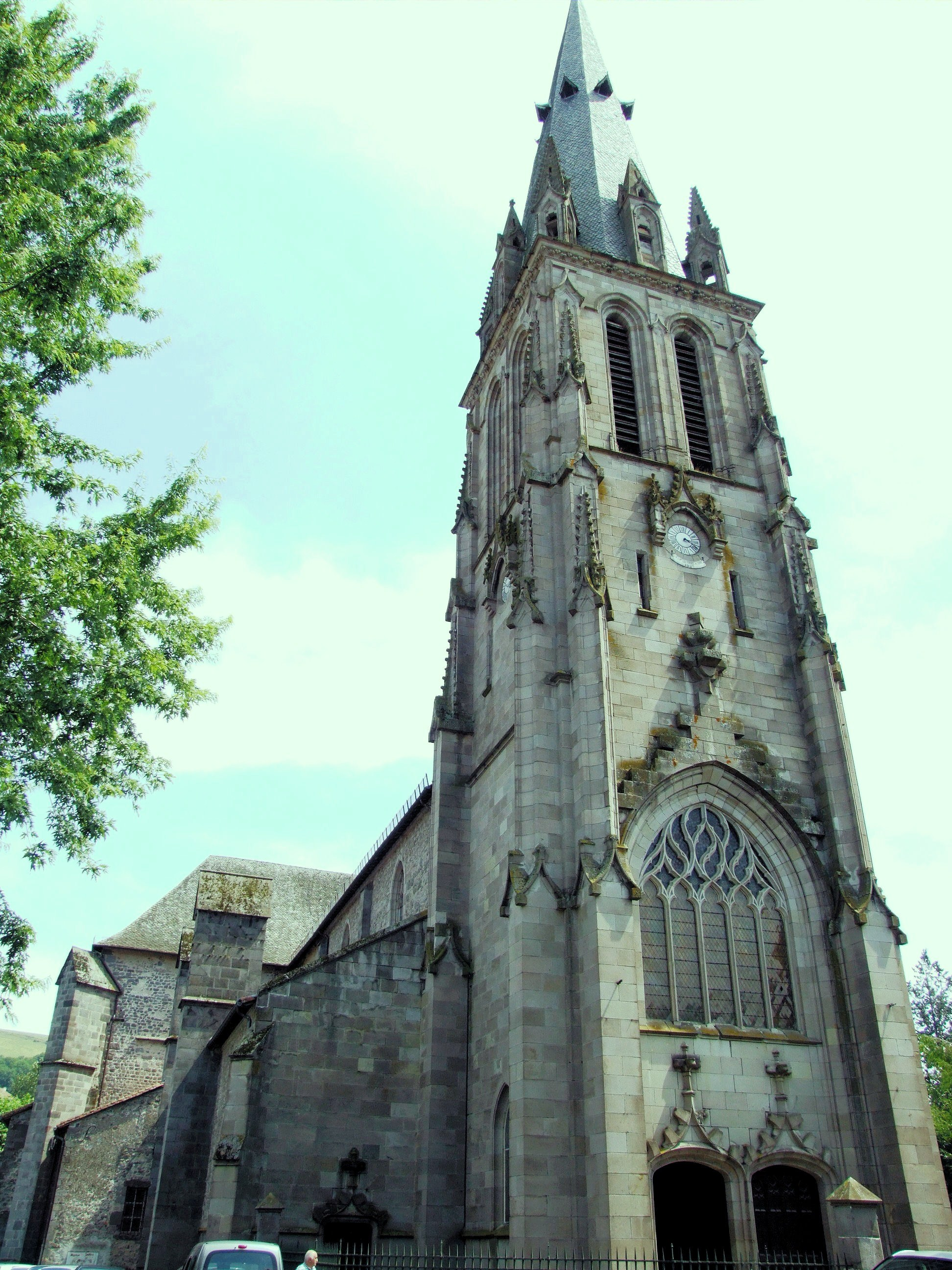 Aurillac - Eglise Saint-Géraud